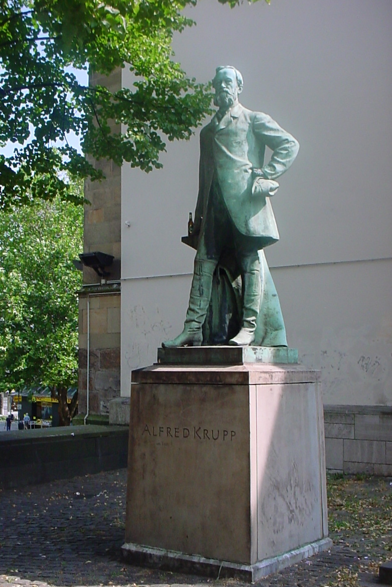 Alfred Krupp-Standbild